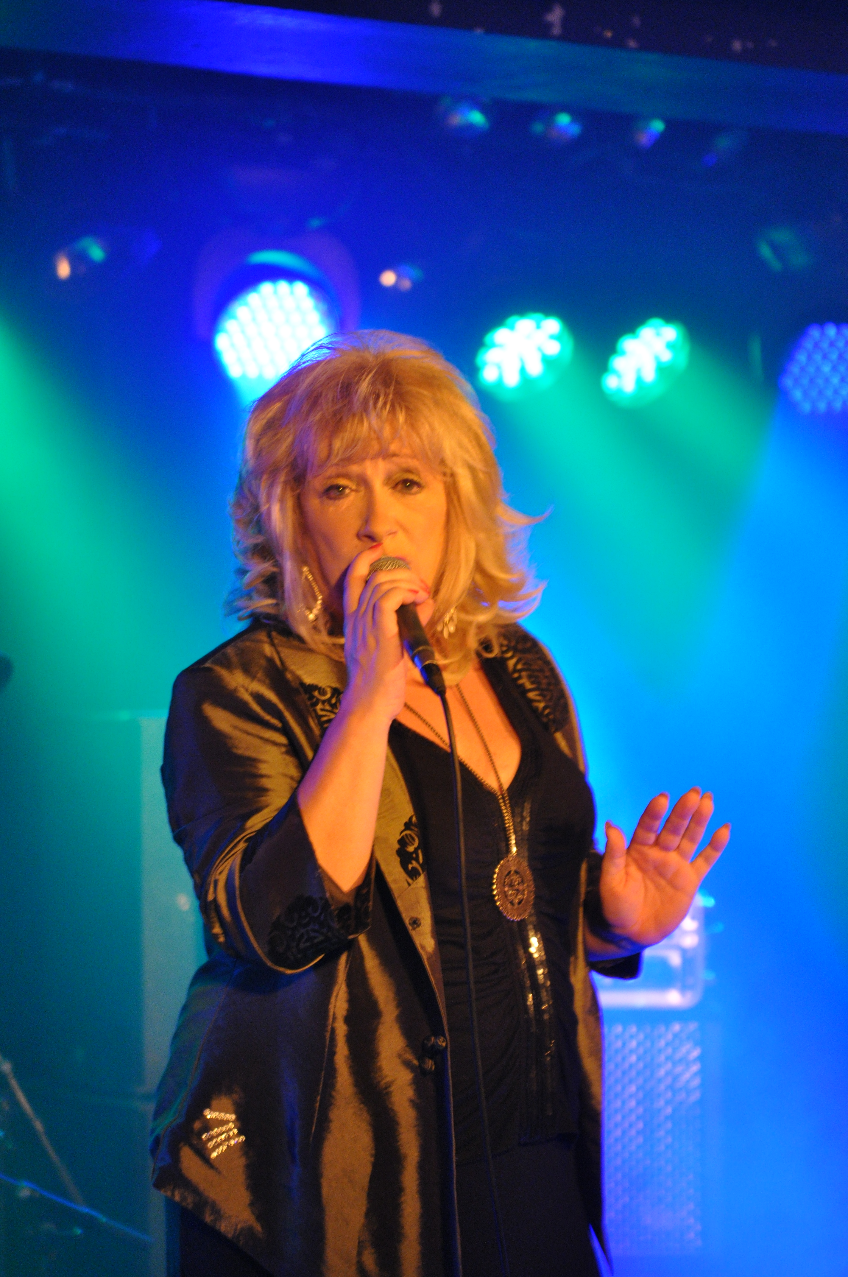 Shakatak am 19. September 2014 im Live Club Barmen in Wuppertal